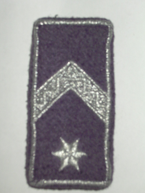 Őrmesteri vállap a büntetés-végrehajtásban Magyarországon